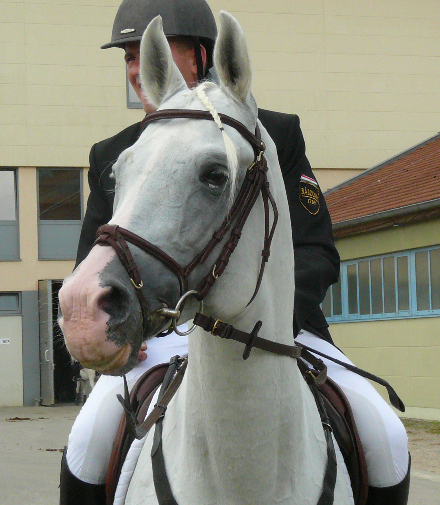 Portrait d'un étalon shagya gris clair